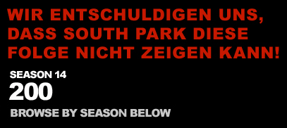 Information auf der deutschen Webpräsenz von South Park zu Episode 200